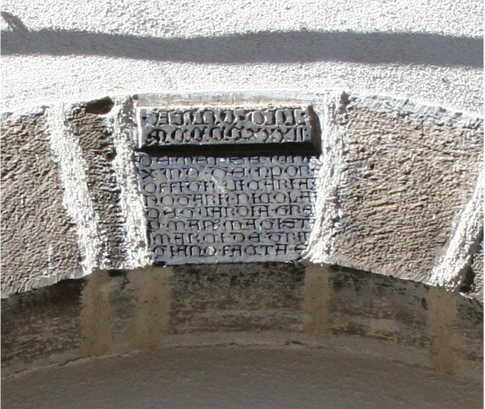 Chiave dell'arco della Chiesa di San Giovanni recante la data del 1432. Epigrafe più antica del paese di Pietracamela in provincia di Teramo.